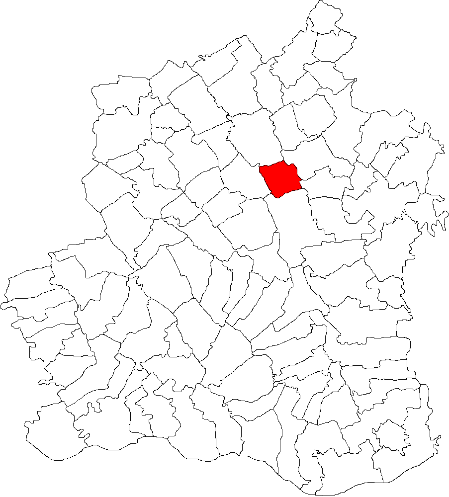 Categorie:Hărţi ale judeţului Teleorman